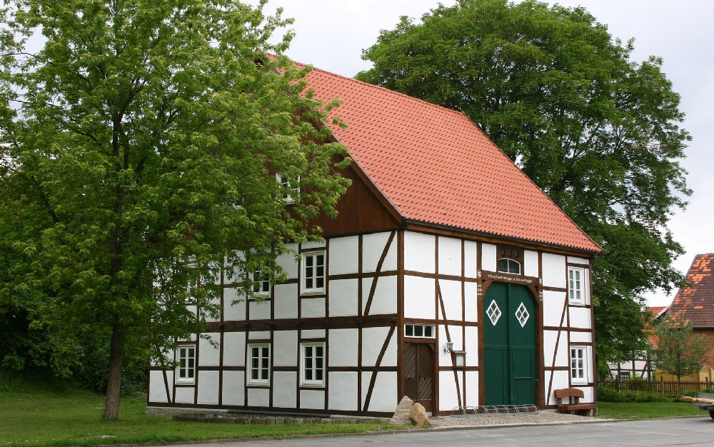 Heimathaus (Heuerlingshaus) in Störmede am Steinweg